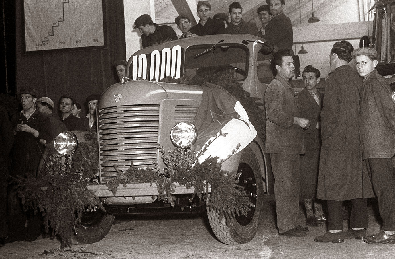 Deset tisoči izdelani Pionir v tovarni TAM.